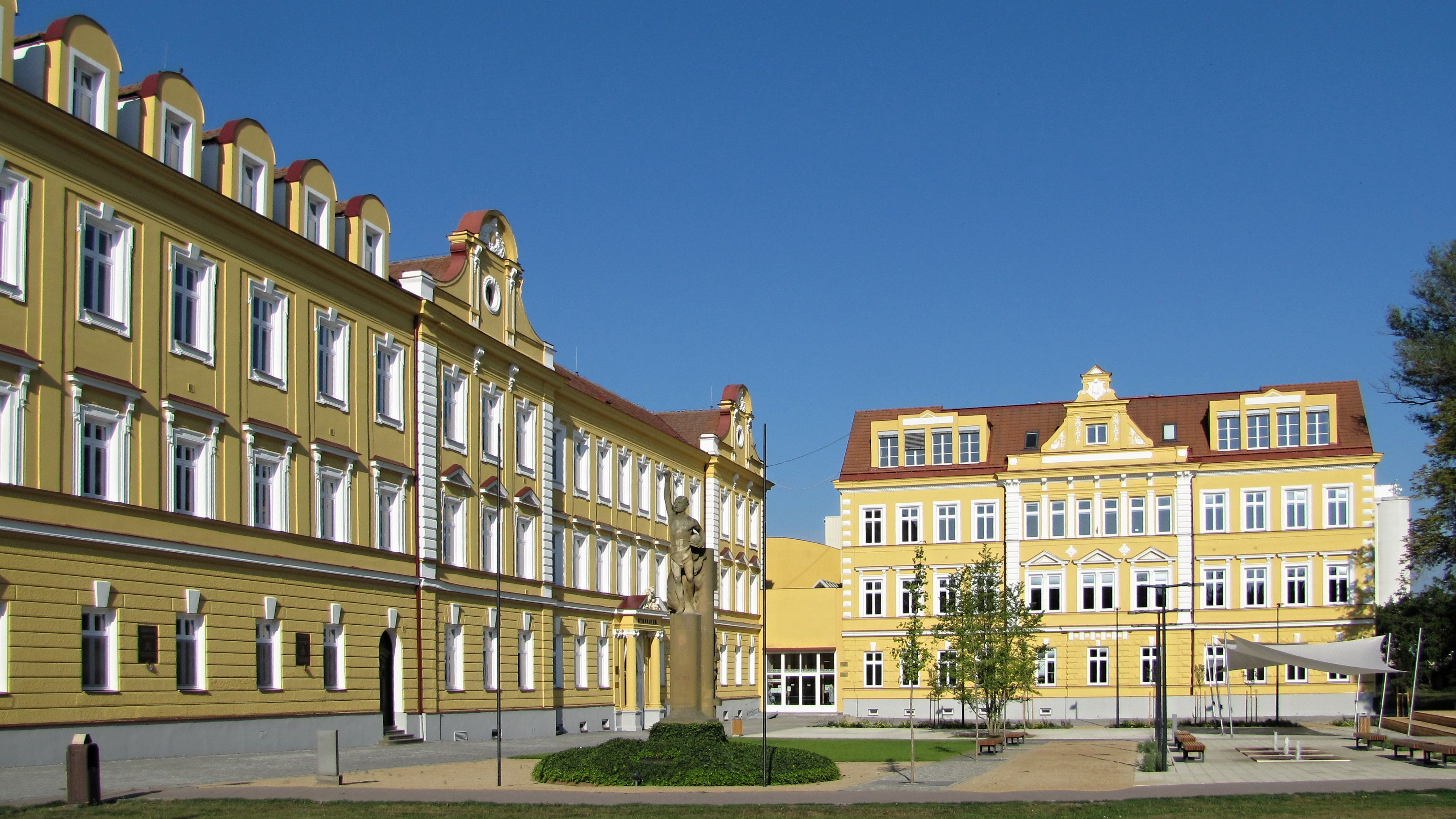 Klvaňovo gymnázium a náměstí Hrdinů pro rekonstrukci v červnu 2018